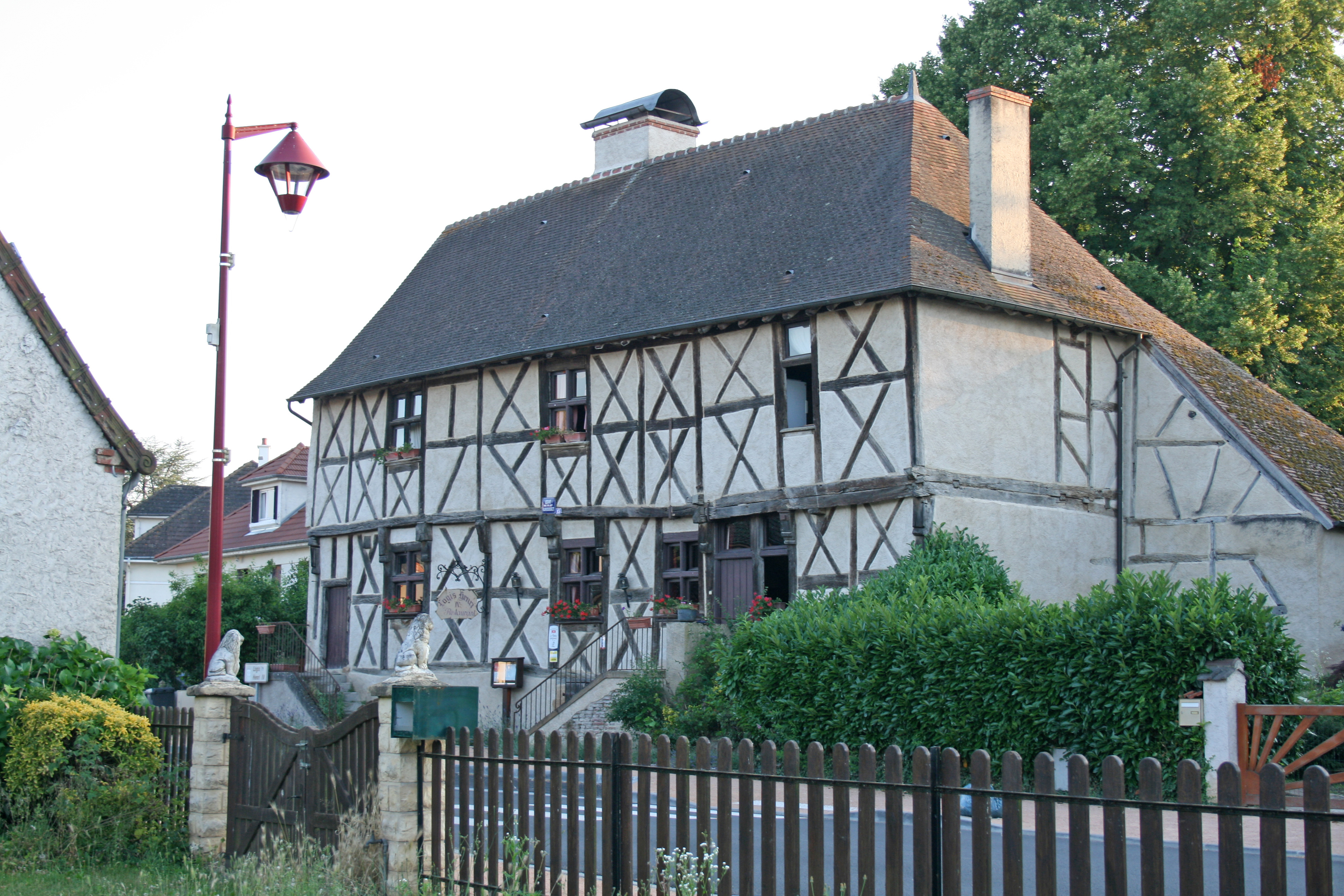 Logis d'Henri IV (Neuilly-le-Réal)